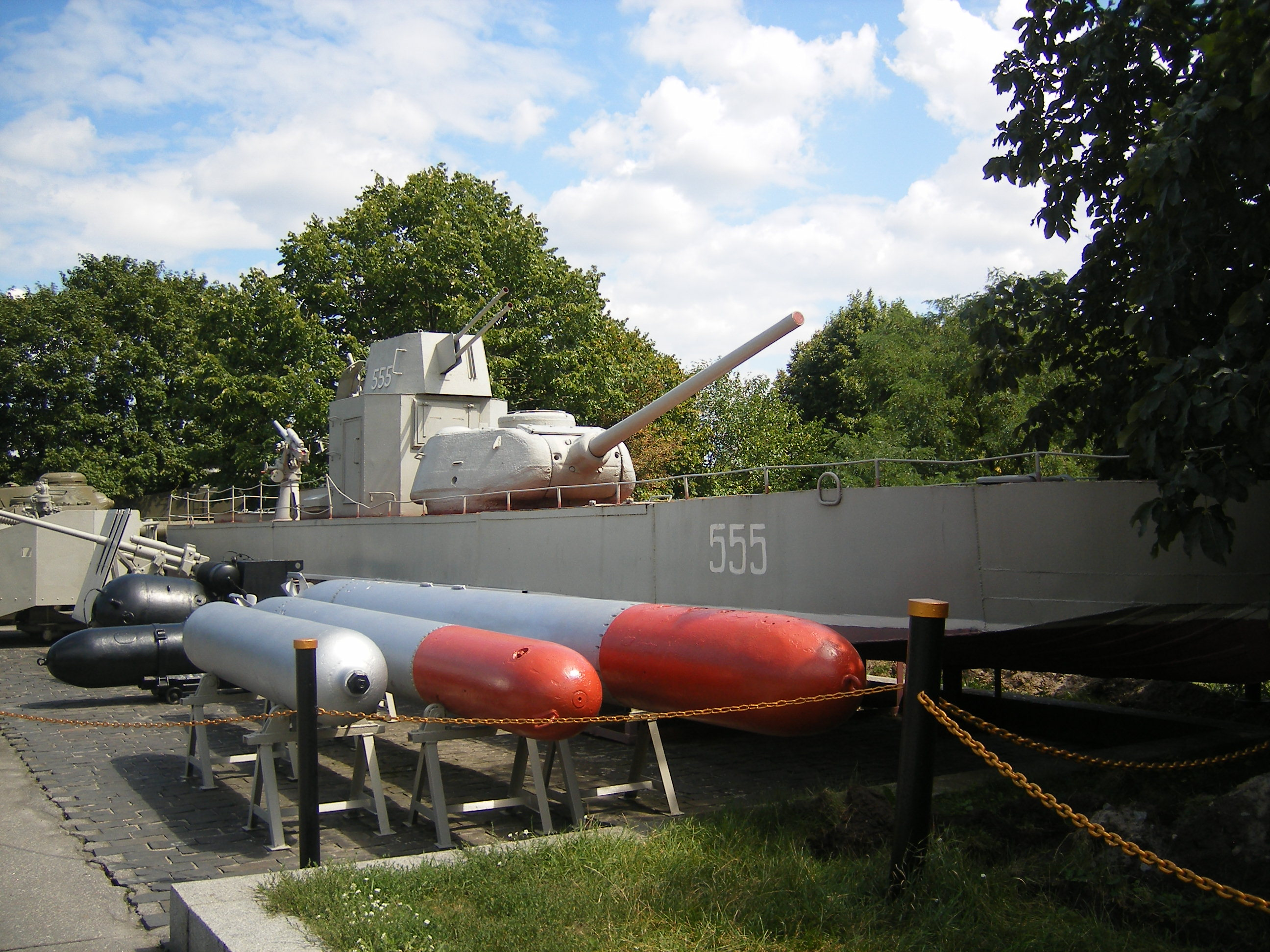 Комплекс Українського державного музею Великої Вітчизняної війни